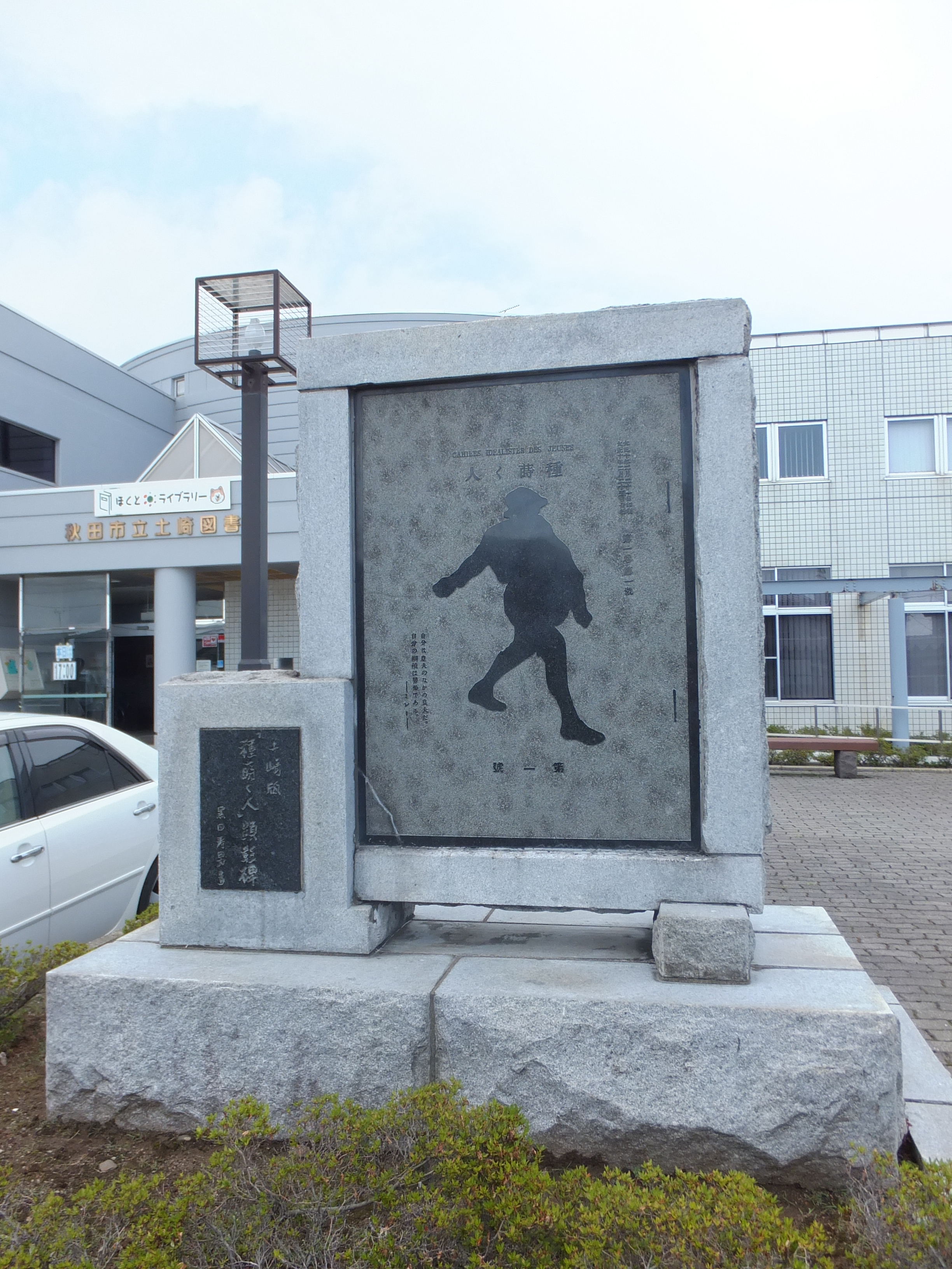 秋田市立土崎図書館の前にある同人誌「種蒔く人」の碑。同地出身の小牧近江らによって、土崎版と称される第一次三冊が刊行された。